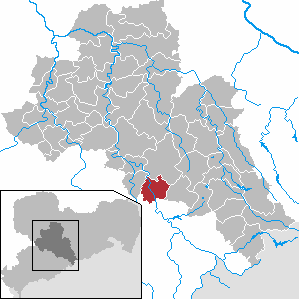 Leubsdorf in Saxony - district Mittelsachsen